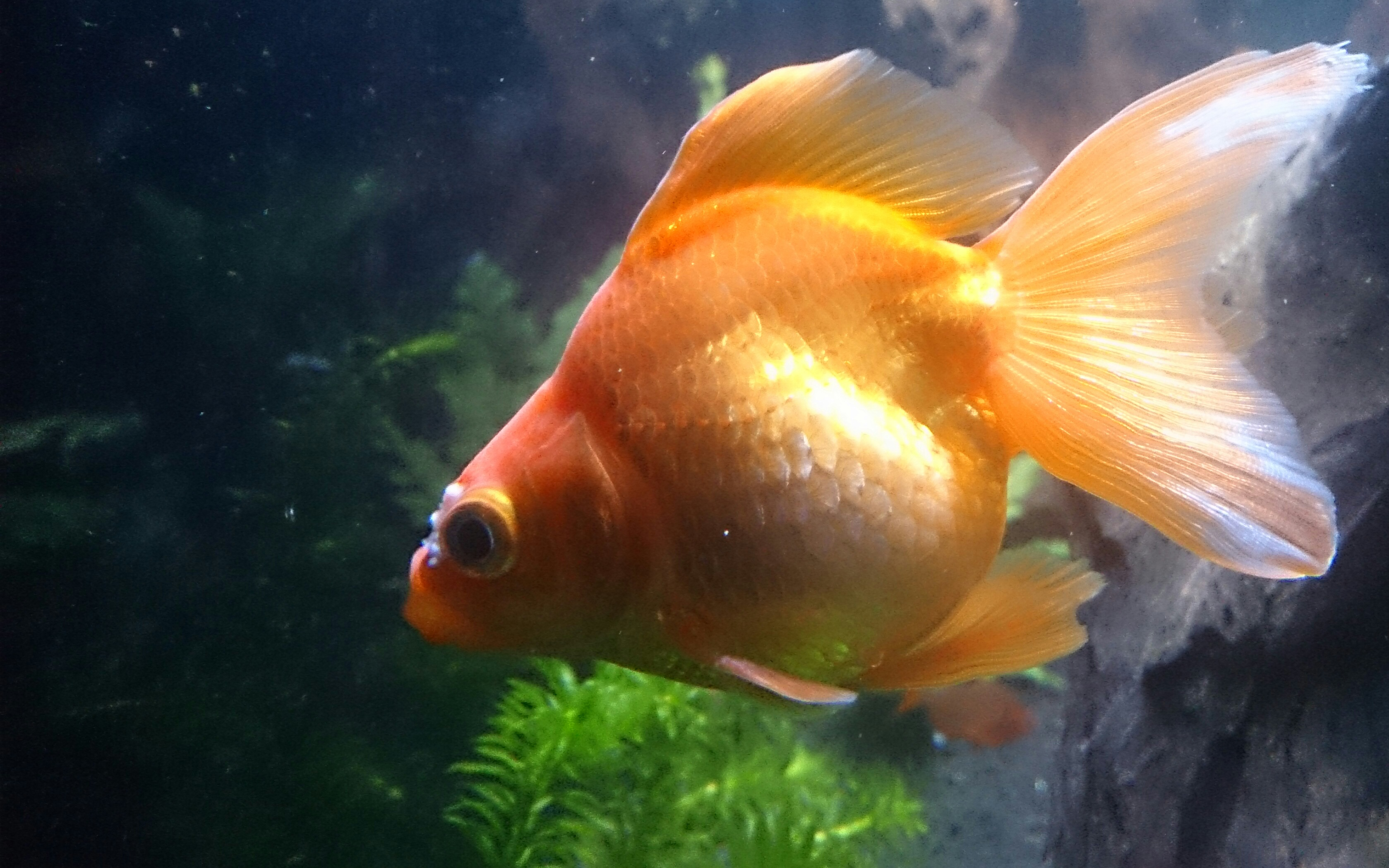 in an aquarium